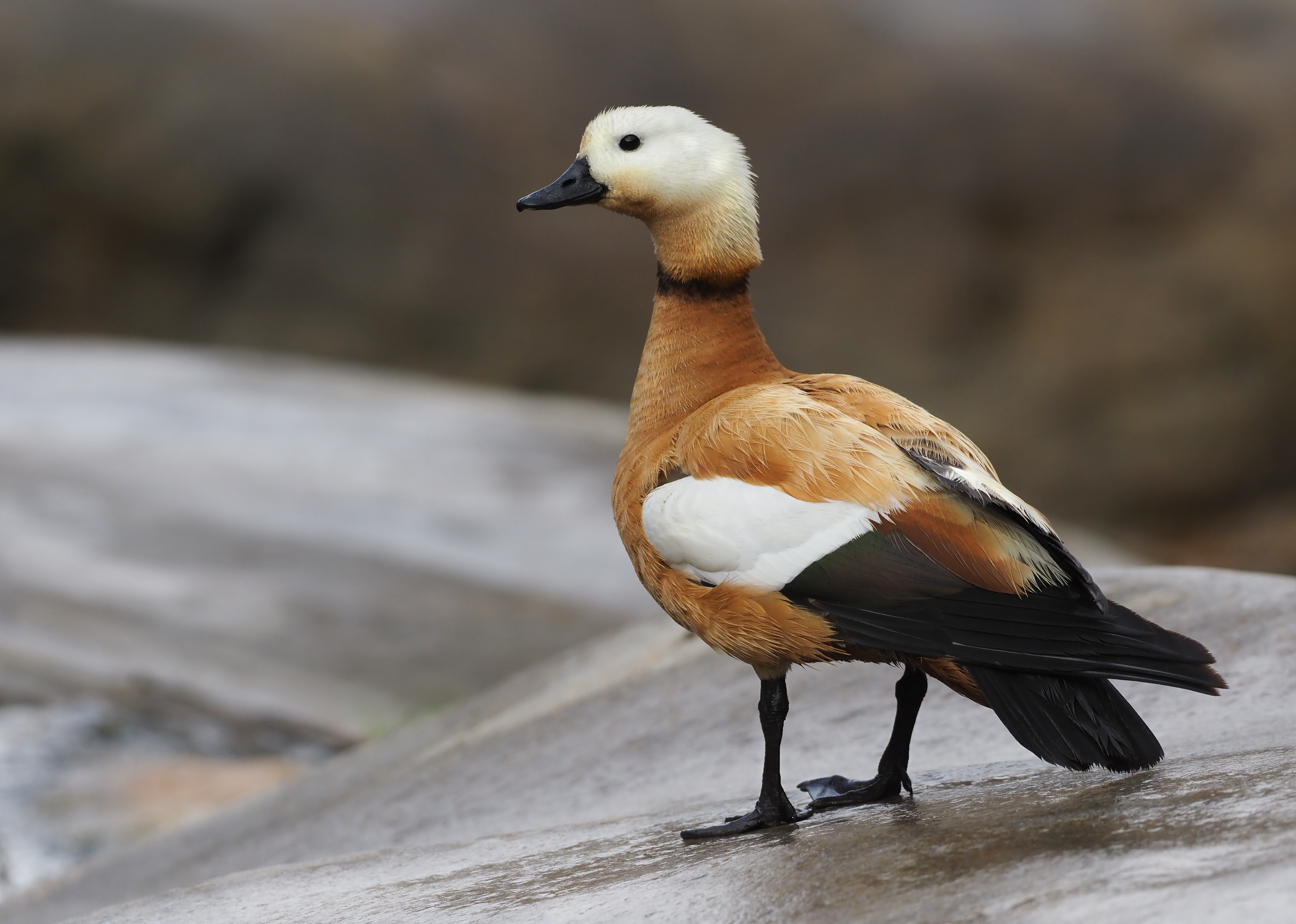 Tadorna ferruginea